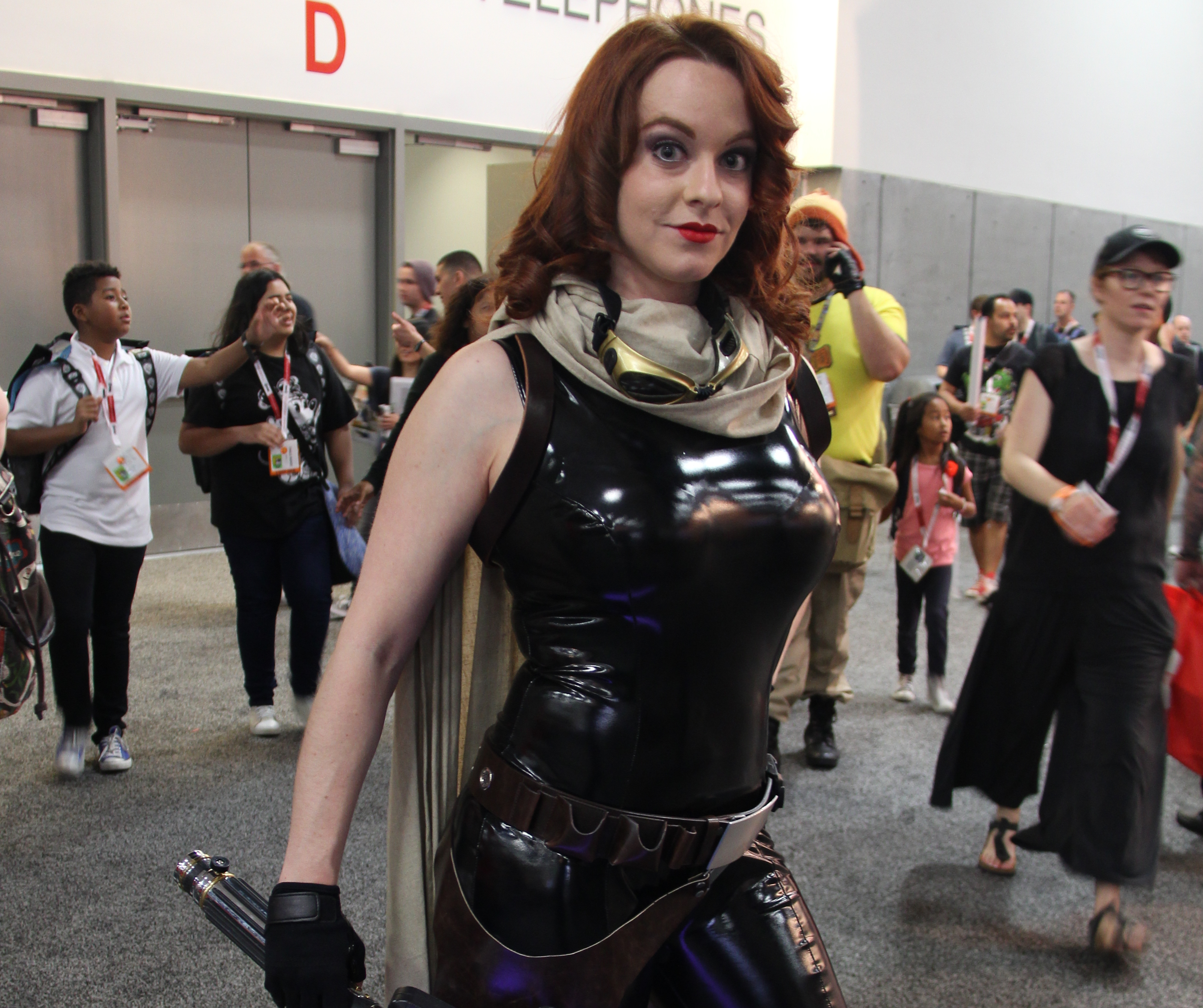 Mara Jade cropped